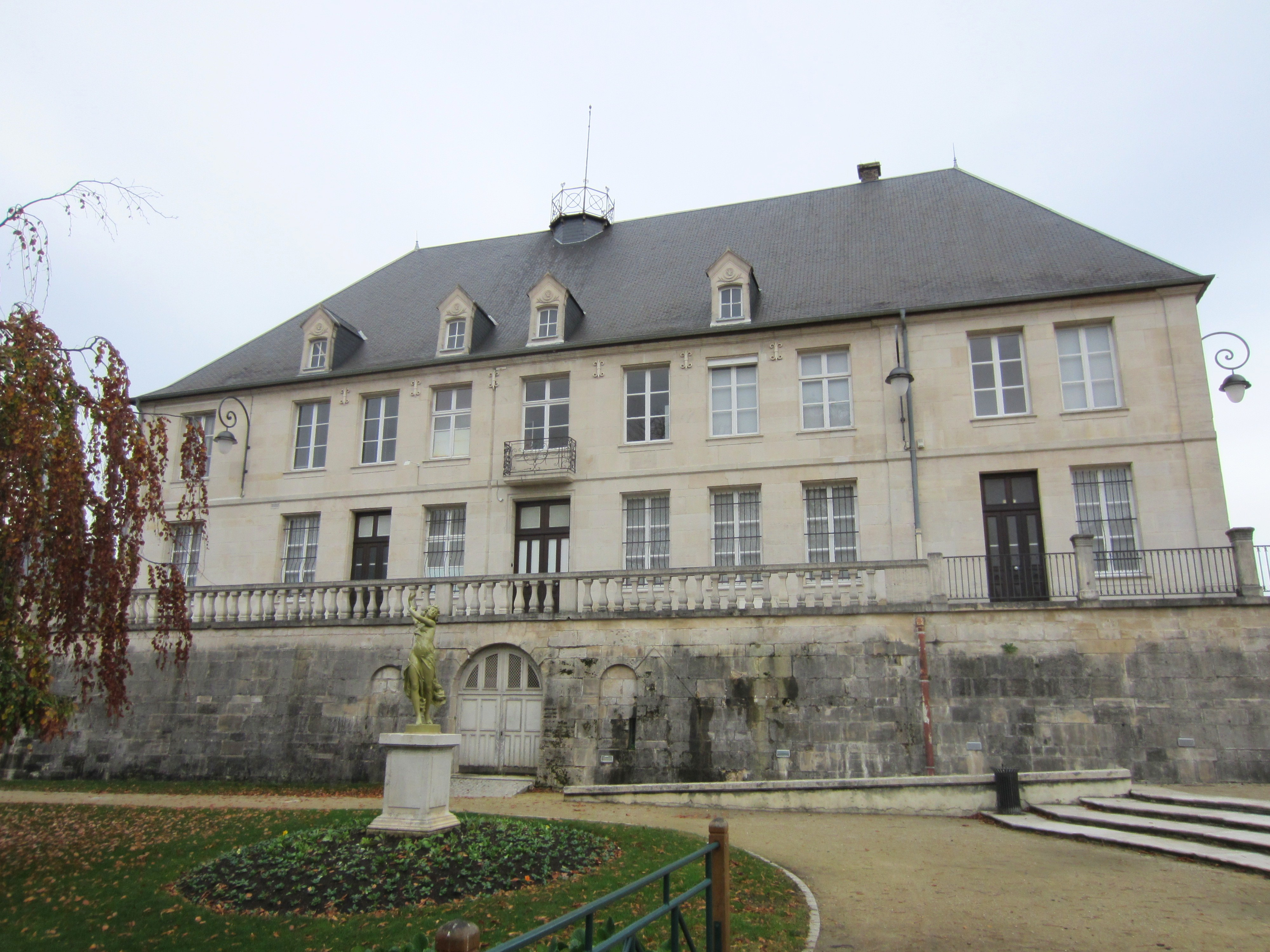 Description